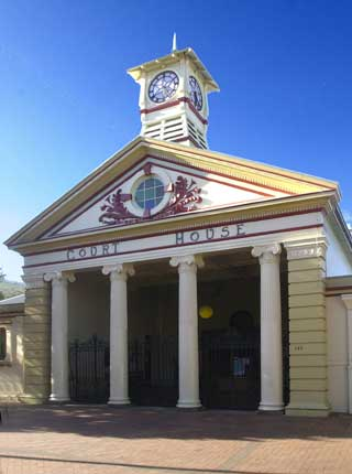 Le palais de justice d'Armidale en Australie